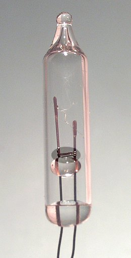 Glassockellampe aus Lichterkette ohne Sockel mit optisch hervorgehobener Strombrücke